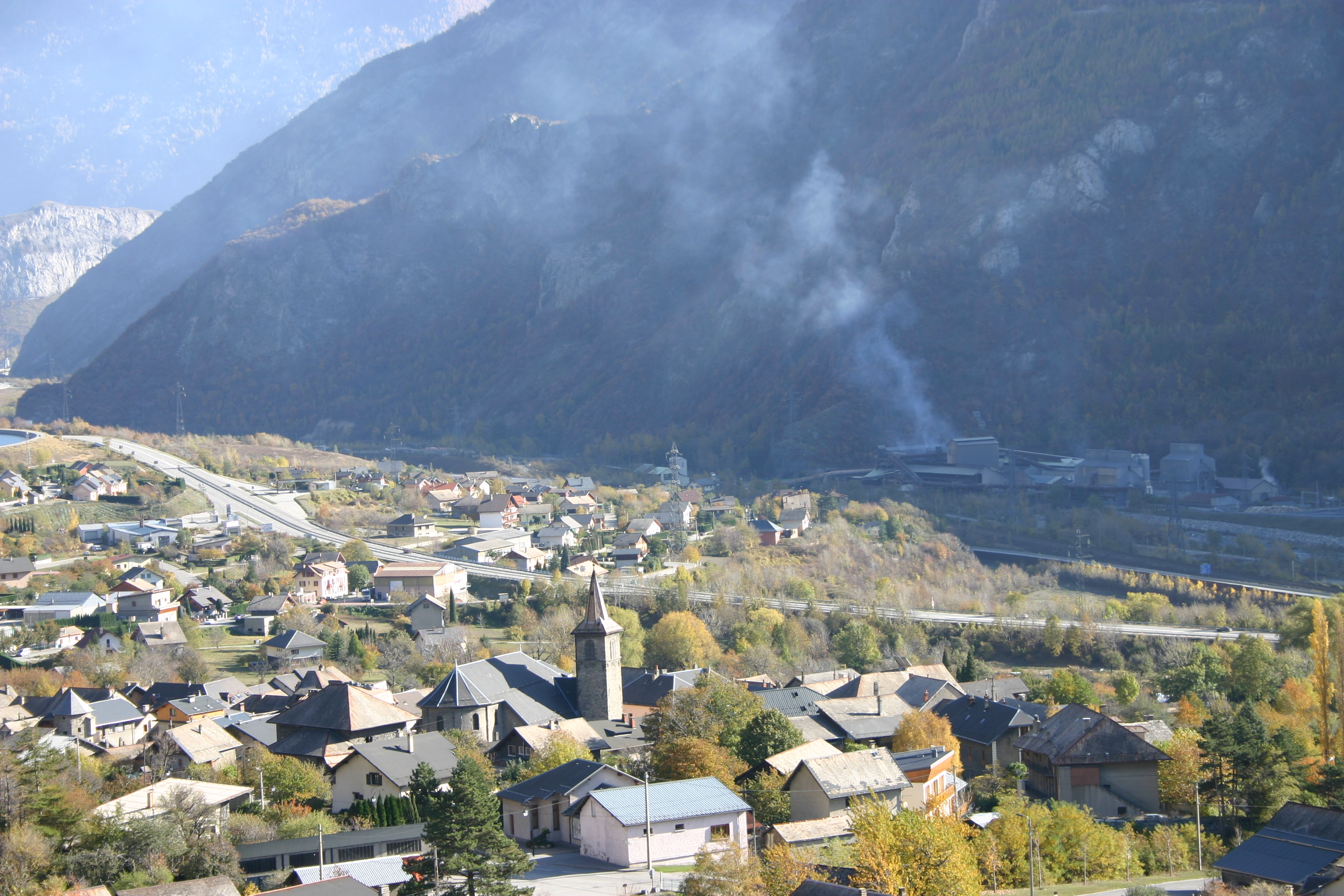 Le village de Saint Julien Montdenis Licensing Auteur : Modesto Alexandre